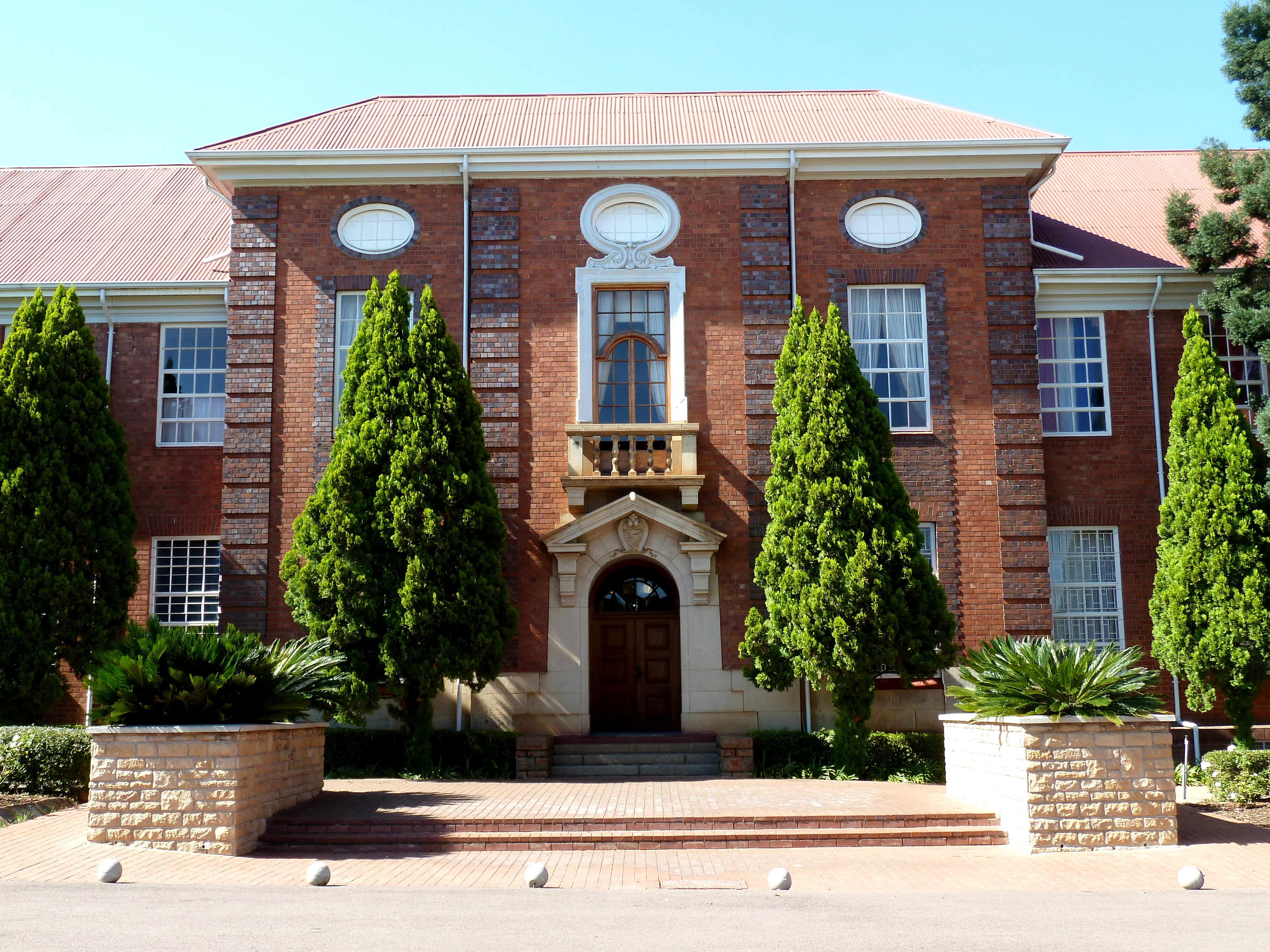 Hoofgebou van die Afrikaanse Hoër Meisieskool in Elandspoort 357-Jr, Pretoria